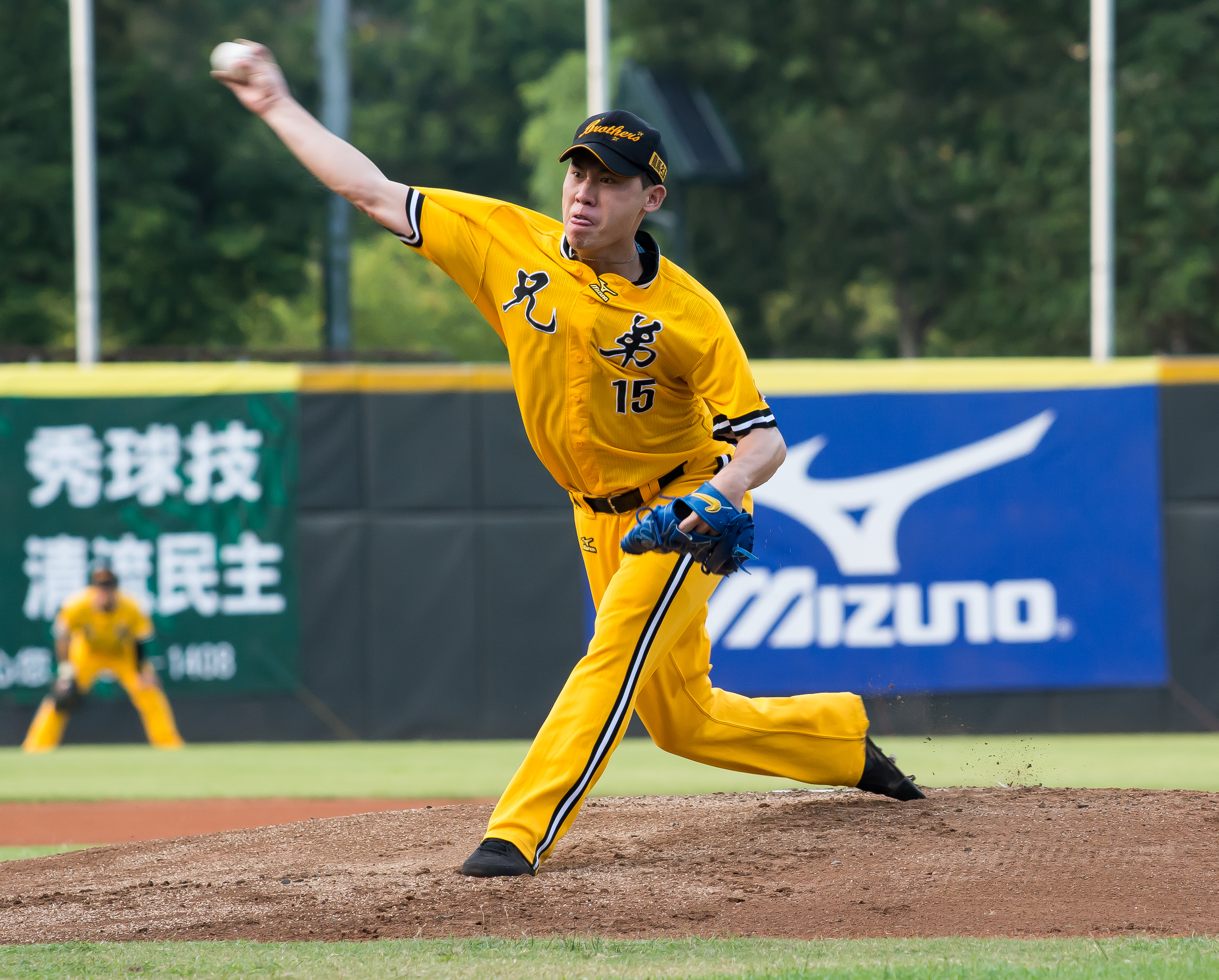 中華職棒中信兄弟隊投手林煜清。